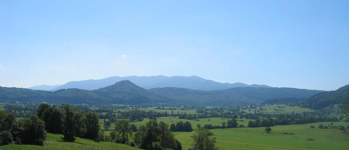 Planinsko polje, Slovenia photo:Ziga 07:06, 20 October 2006 (UTC)